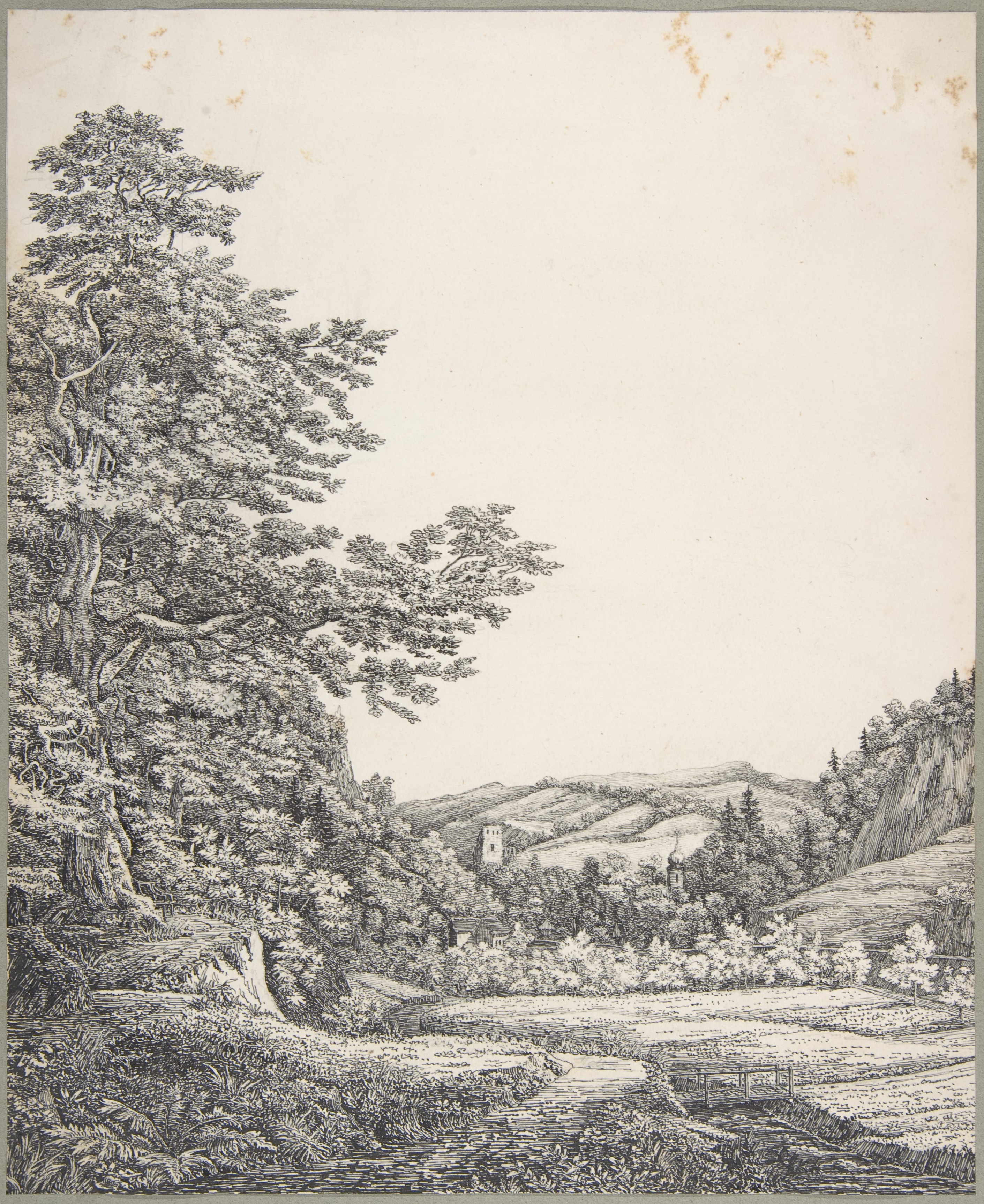 Drawing; Drawings